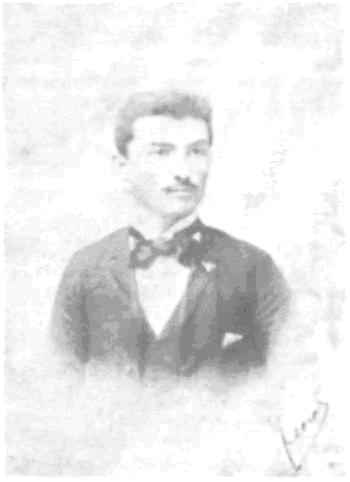 Александър Хаджипанов.